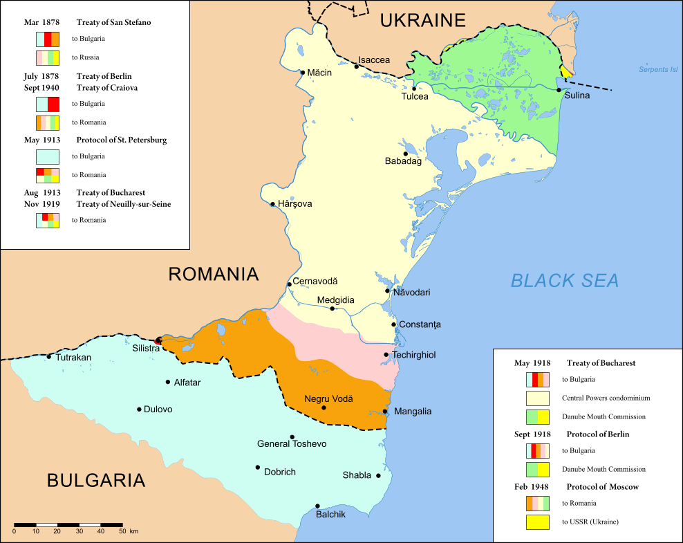 Borders in Dobruja since 1878